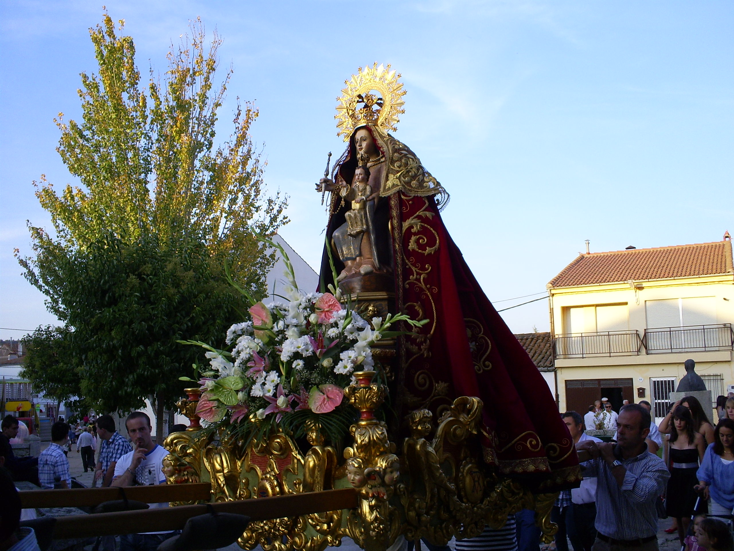 virgen de valparaiso en procesion